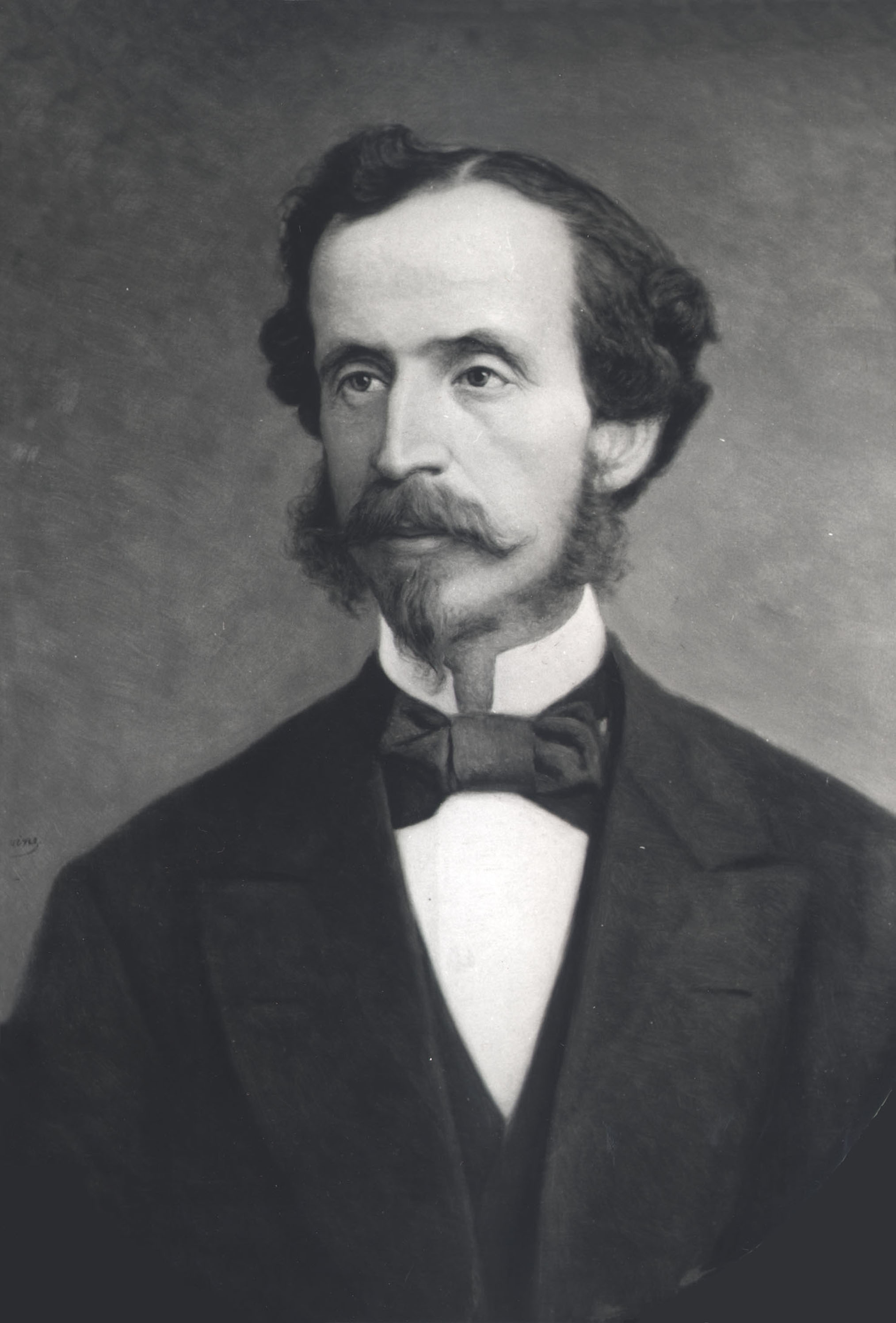 Adolfo Ibáñez Gutiérrez (n. Santiago de Chile, 28 de noviembre de 1827 - † íd., 12 de agosto de 1898) fue un abogado, juez, diplomático y ministro chileno, destacándose sus aportes para lograr un acuerdo de límites territoriales con Argentina y la mediación con Bolivia y Perú.